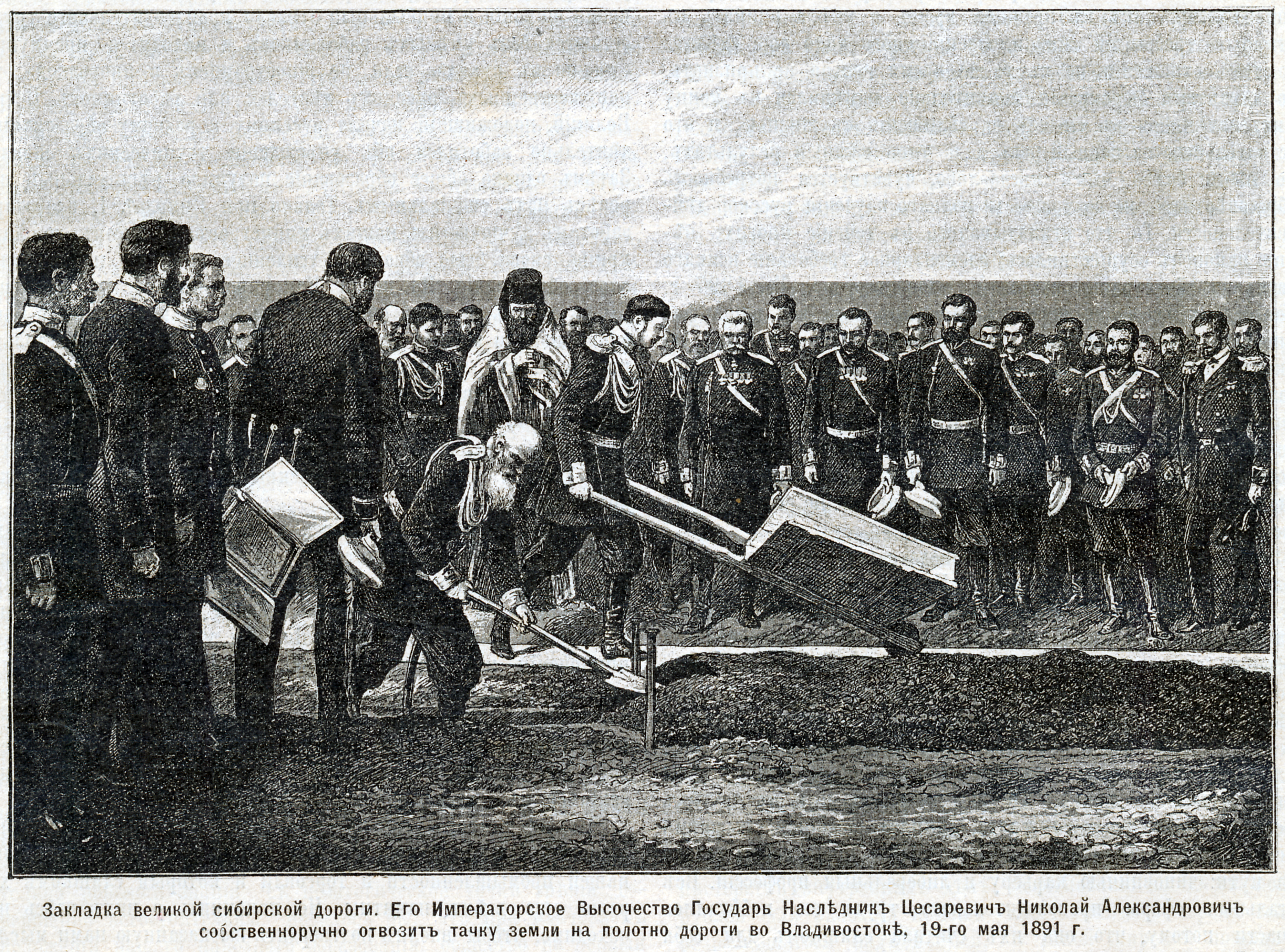 Церемония закладки транссибирской магистрали.